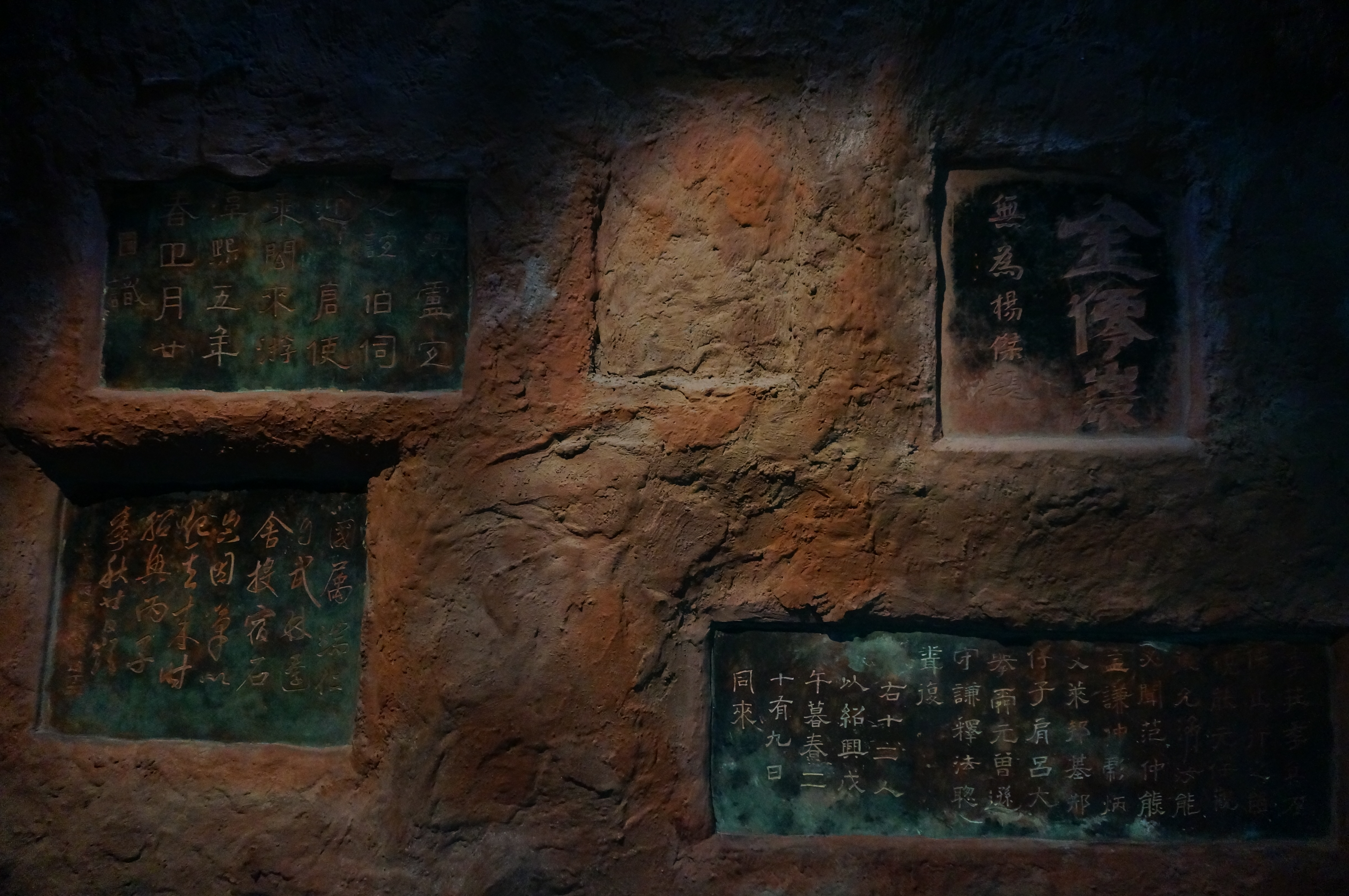 仙岩洞摩崖题记模型，衢州博物馆藏。